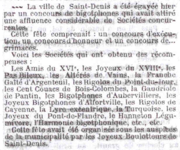 Compte-rendu d'un concours de Bigotphones à Saint-Denis près de Paris.